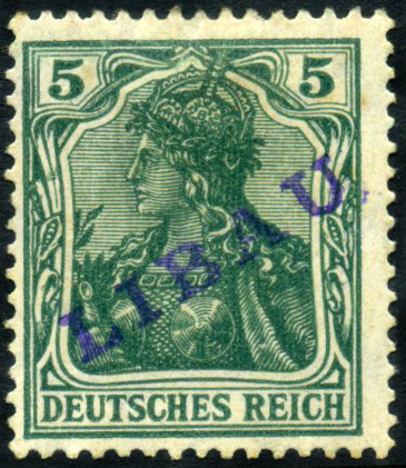 Провизорий Либавы (Лиепая, Латвия)